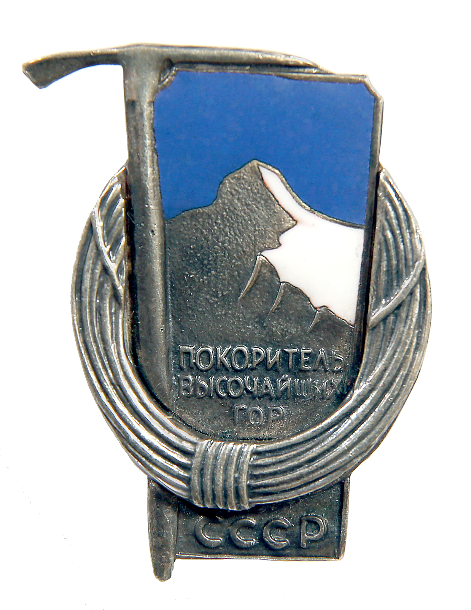 Jaan Künnapi Lumeleopardi märk Nr. 204 (1987)